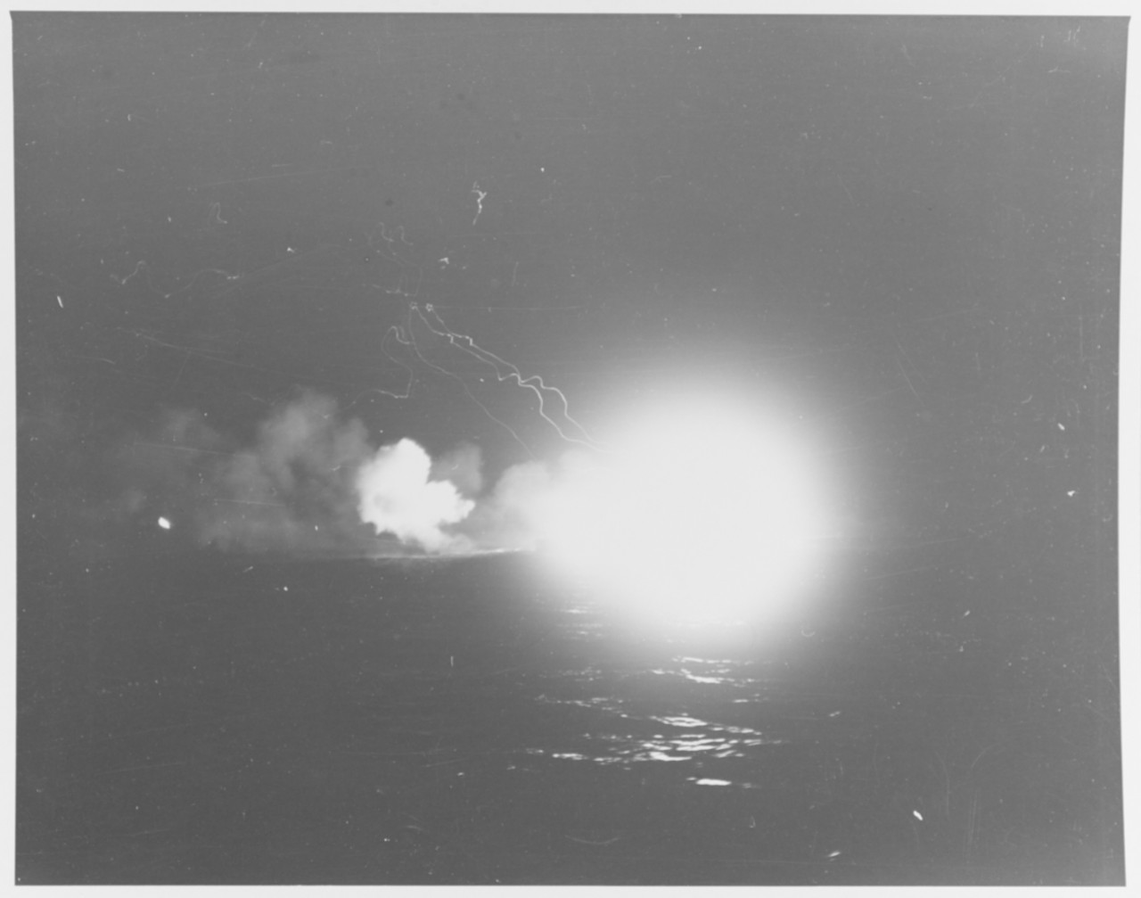 USS Mobile (CL-63) firing on the Japanese destroyer Hatsuzuki, during the evening of 25 October 1944, at the end of the Battle off Cape Engaño. Photographed from USS Wichita (CA-45). Official U.S. Navy Photograph, now in the collections of the National Archives.